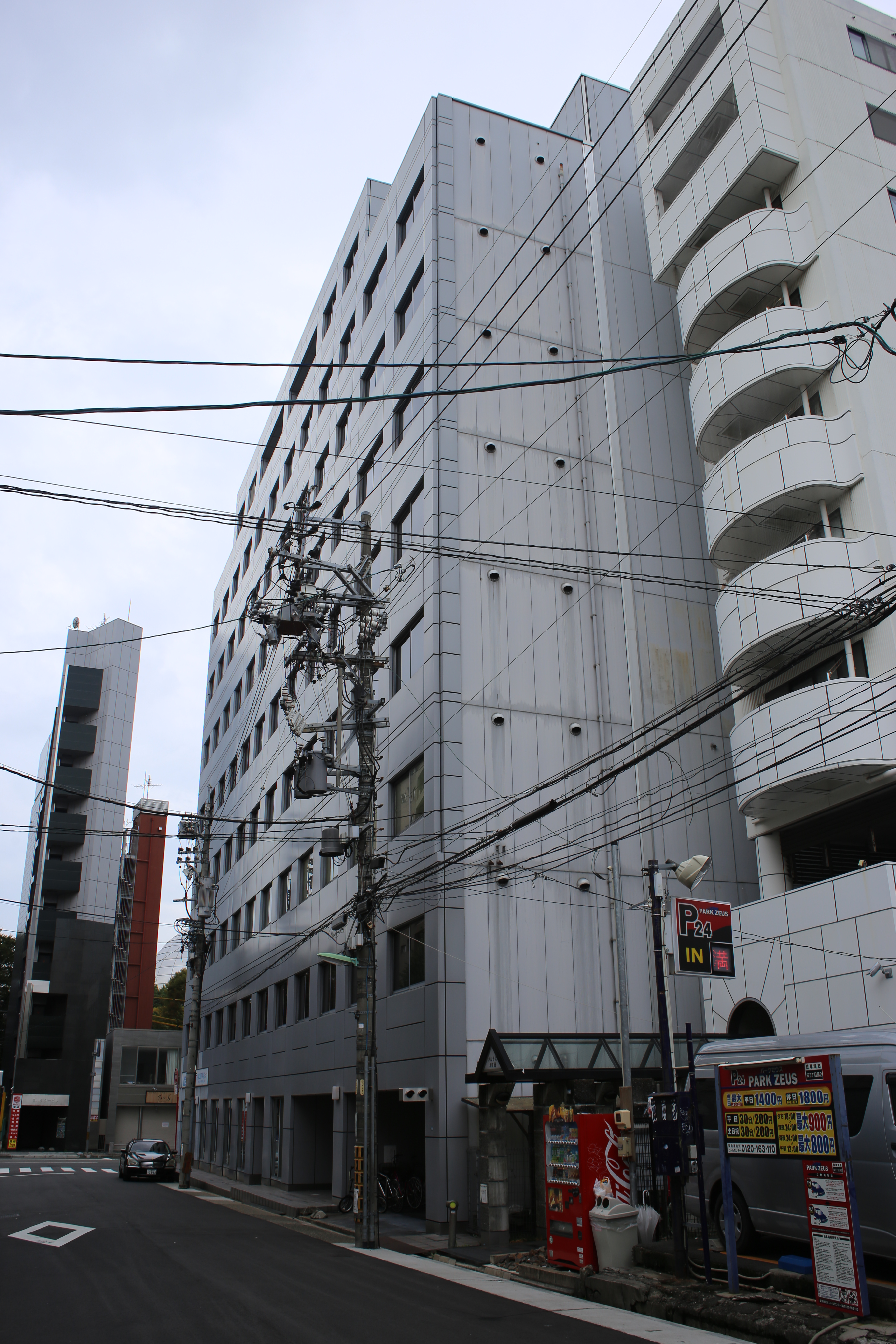 名古屋市中区栄三丁目のKSイセヤビルを南側公道東側より撮影